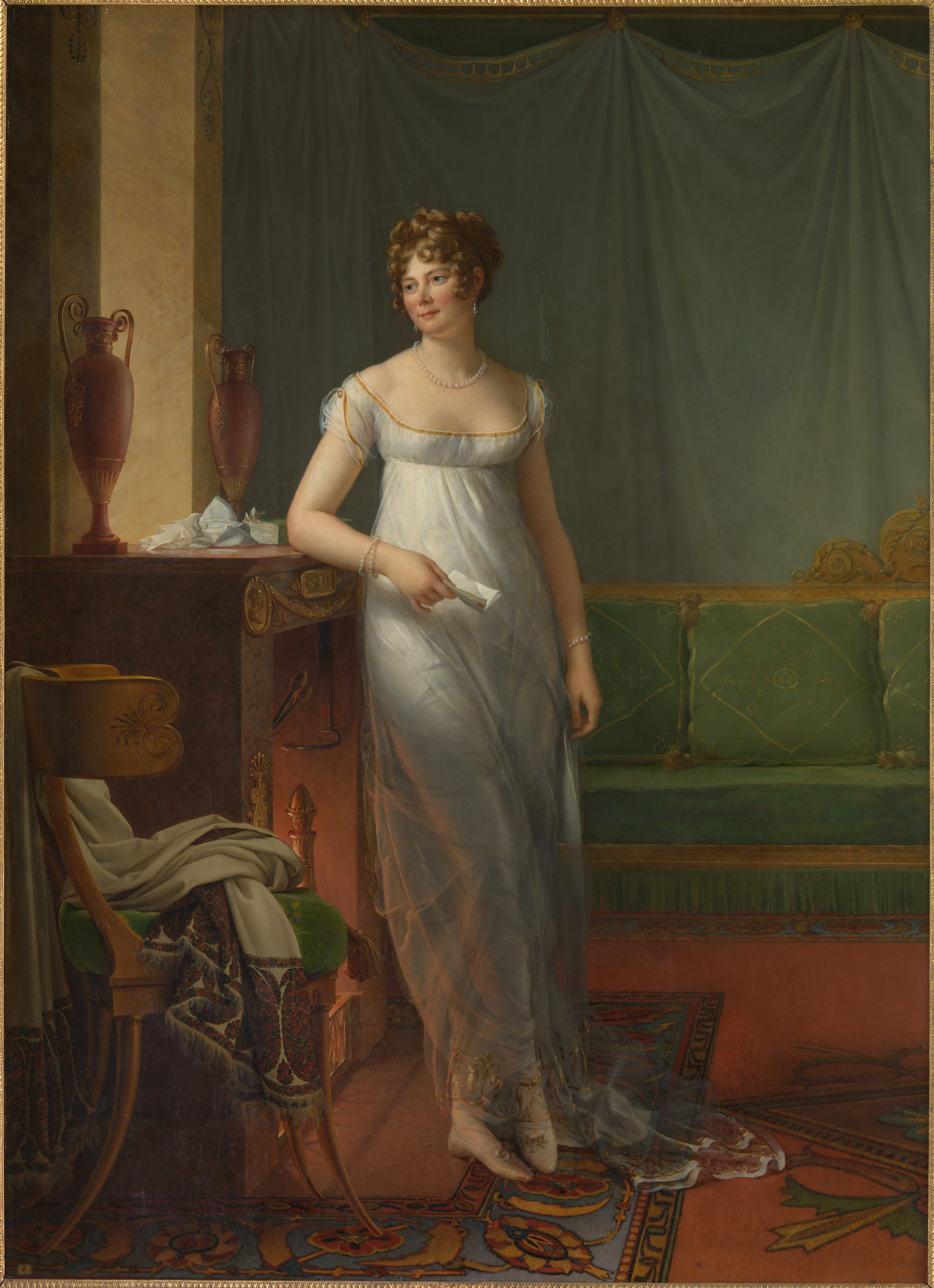 Painting; Paintings